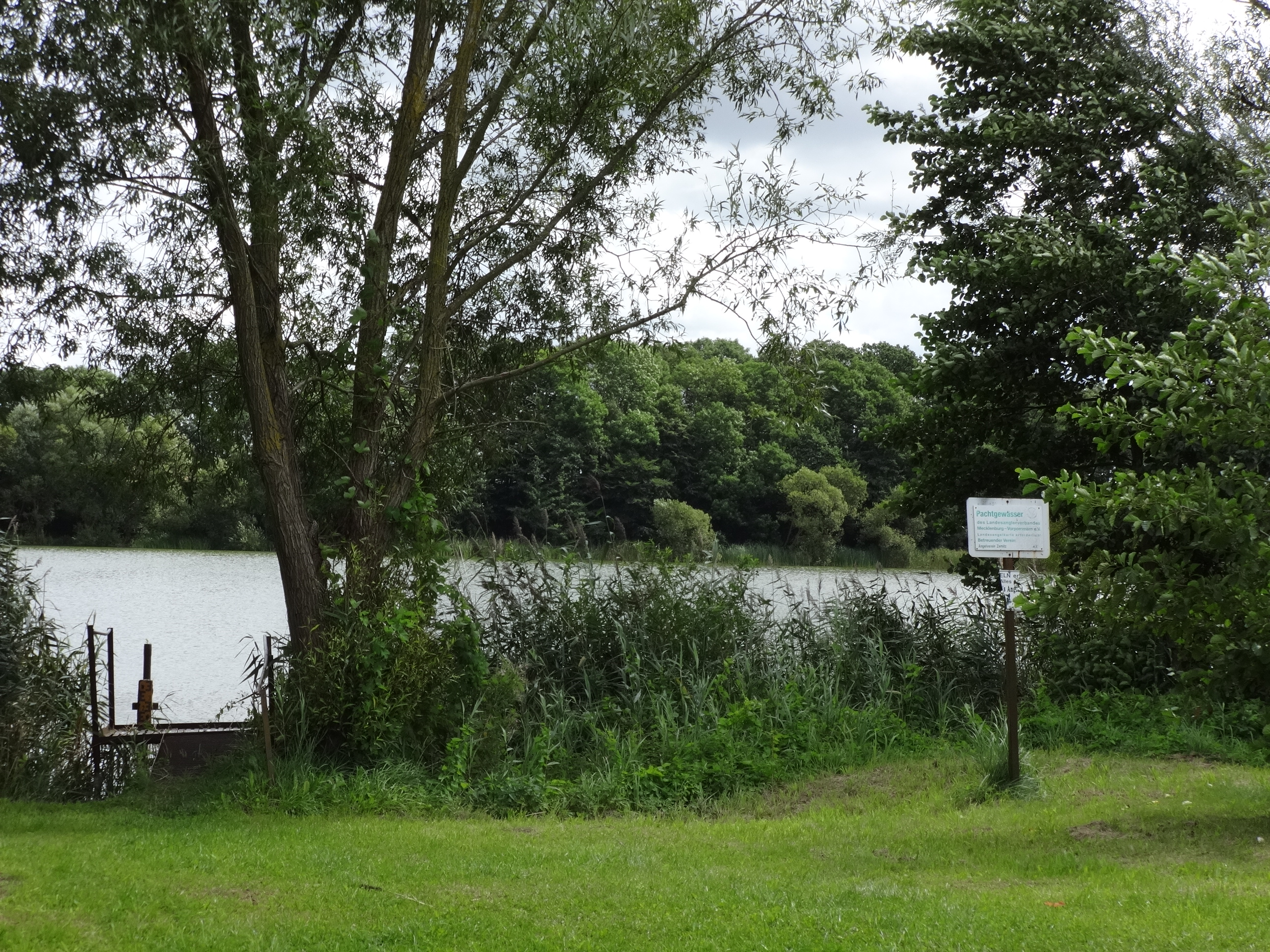 Blick auf den Hohen See in Hohensee, ein Ortsteil von Zemitz, Vorpommern-Greifswald